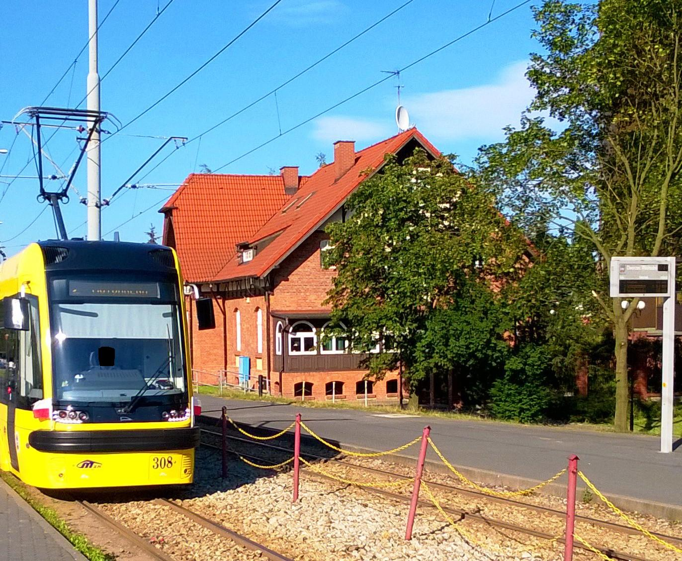 Swing Toruń